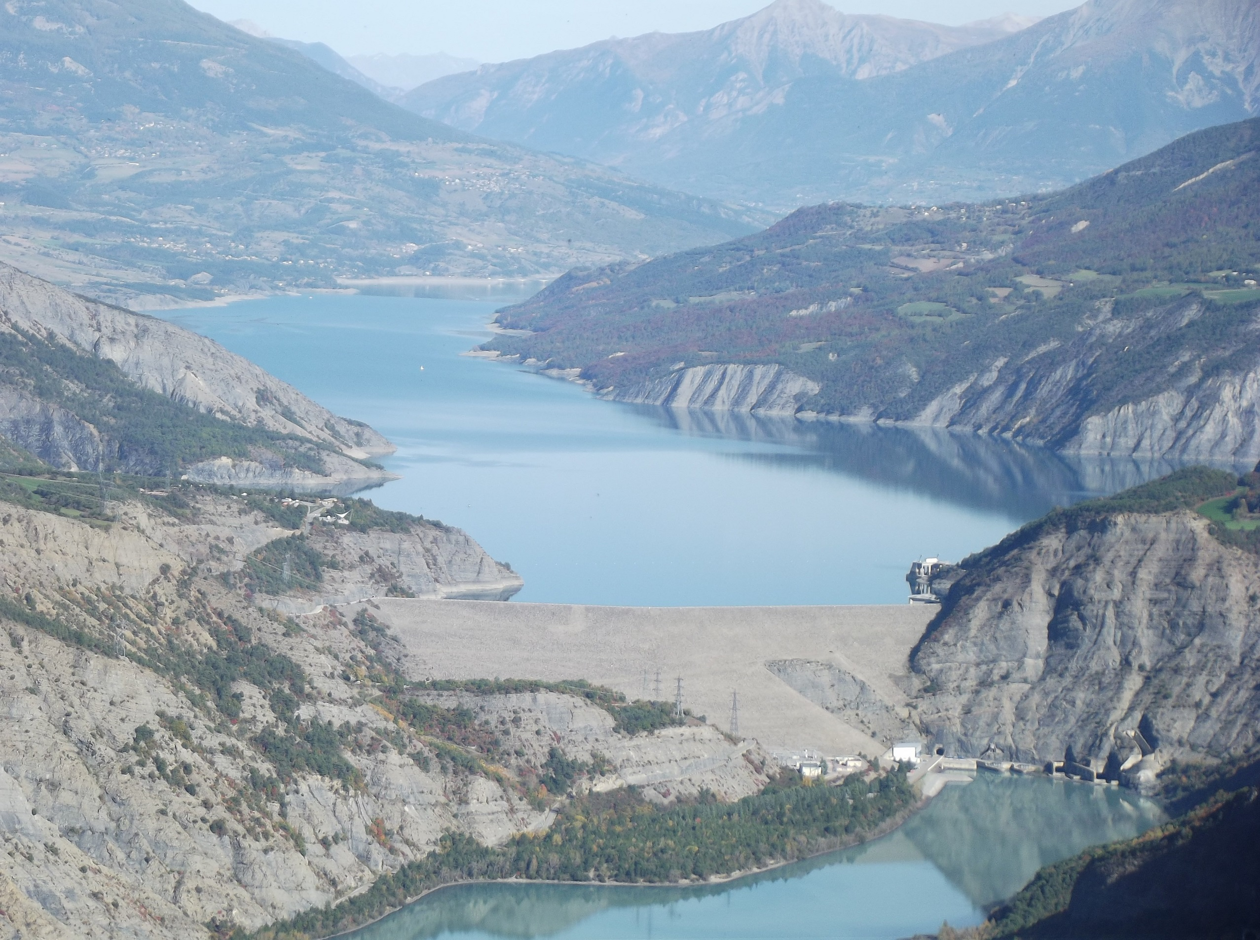 Vue du lac de Serre-Ponçon et du lac d'Espinasses depuis la crête de la Scie (zoom)